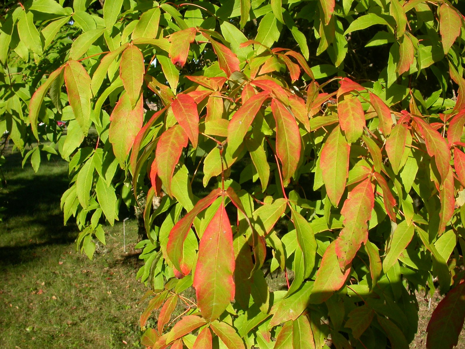 Acer triflorum leaves